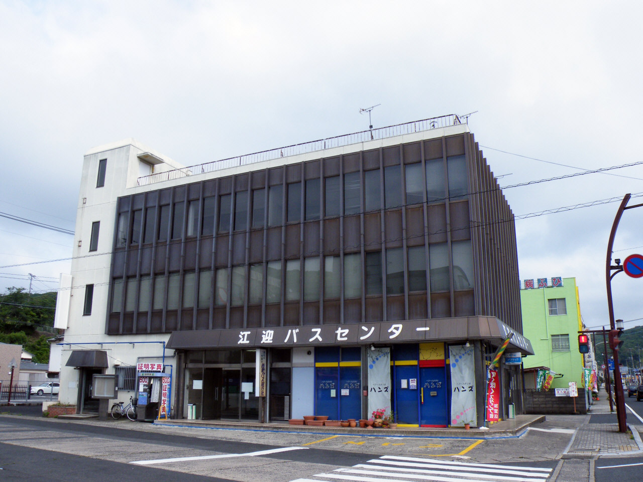 江迎バスセンター（長崎県江迎町）